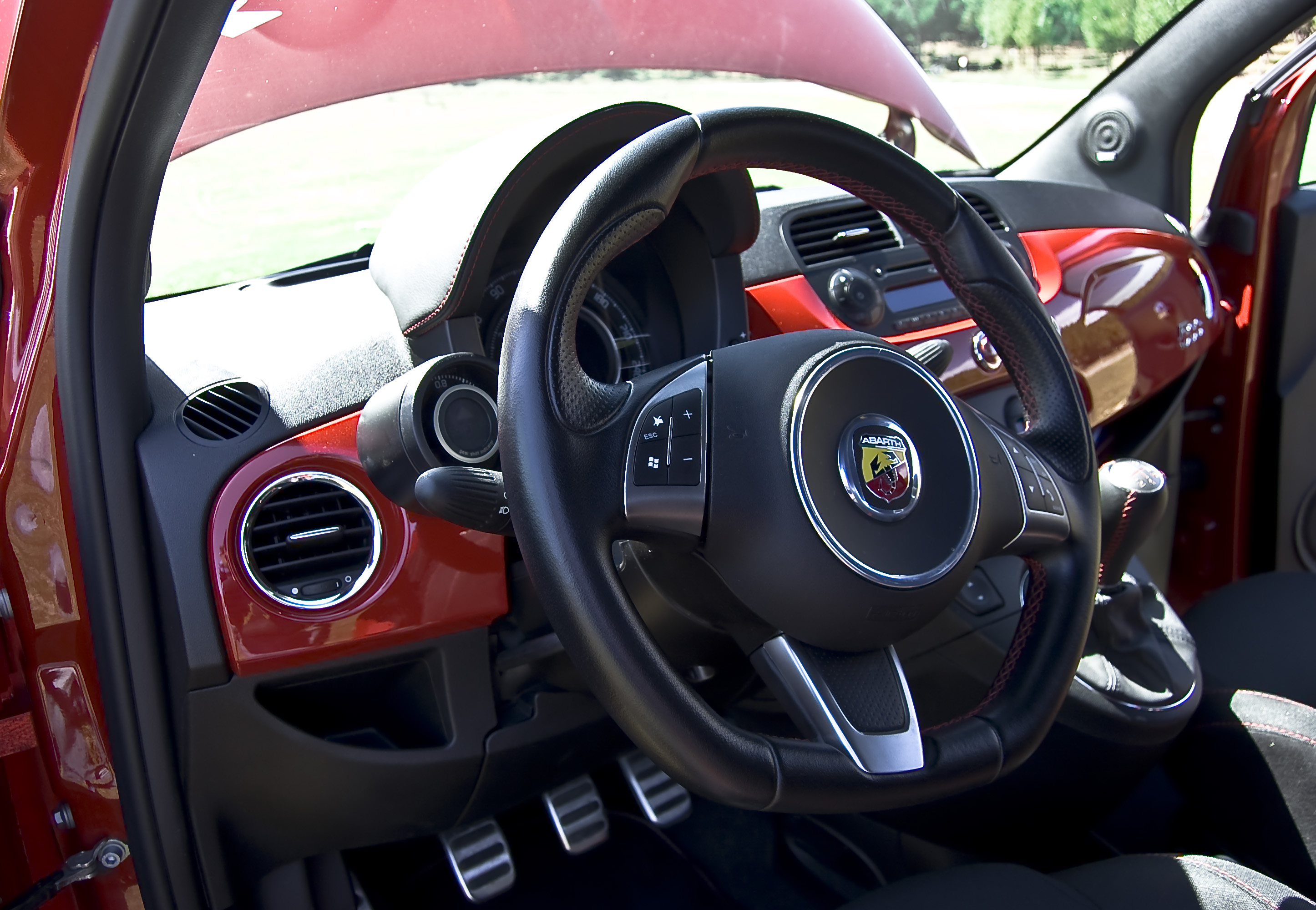 Prueba del Abarth 500 y photoshoot para Diariomotor